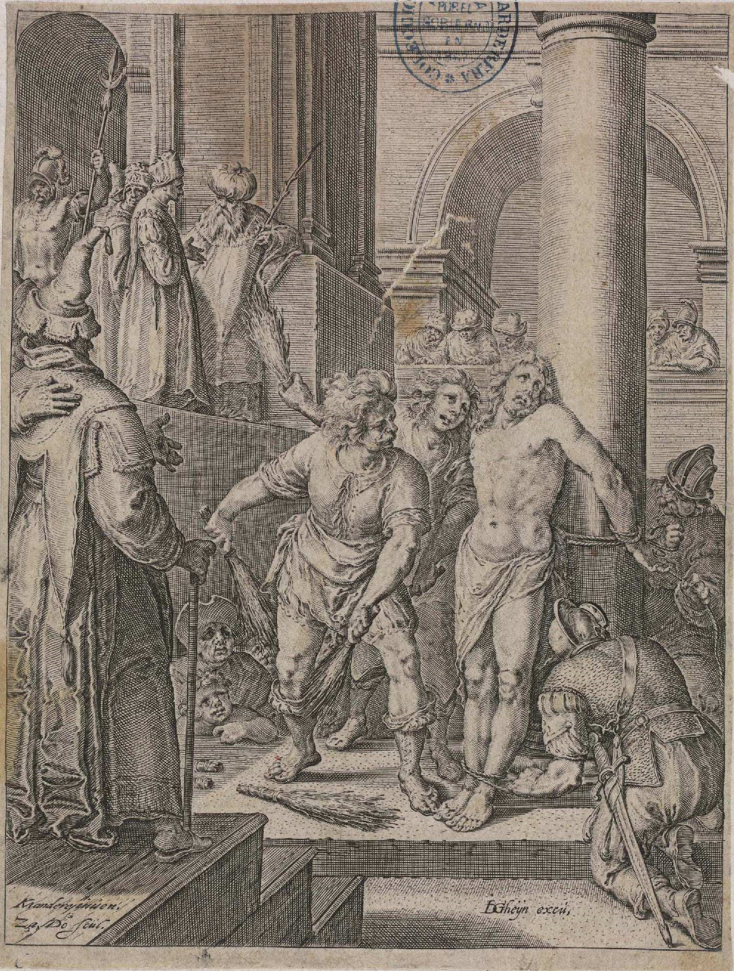 Cristo atado a la columna, grabado a buril de Zacharias Dolendo según Karel van Mander. Firmado KMander inven, Za, Do scúl. JGheyn excu. Biblioteca Nacional de España